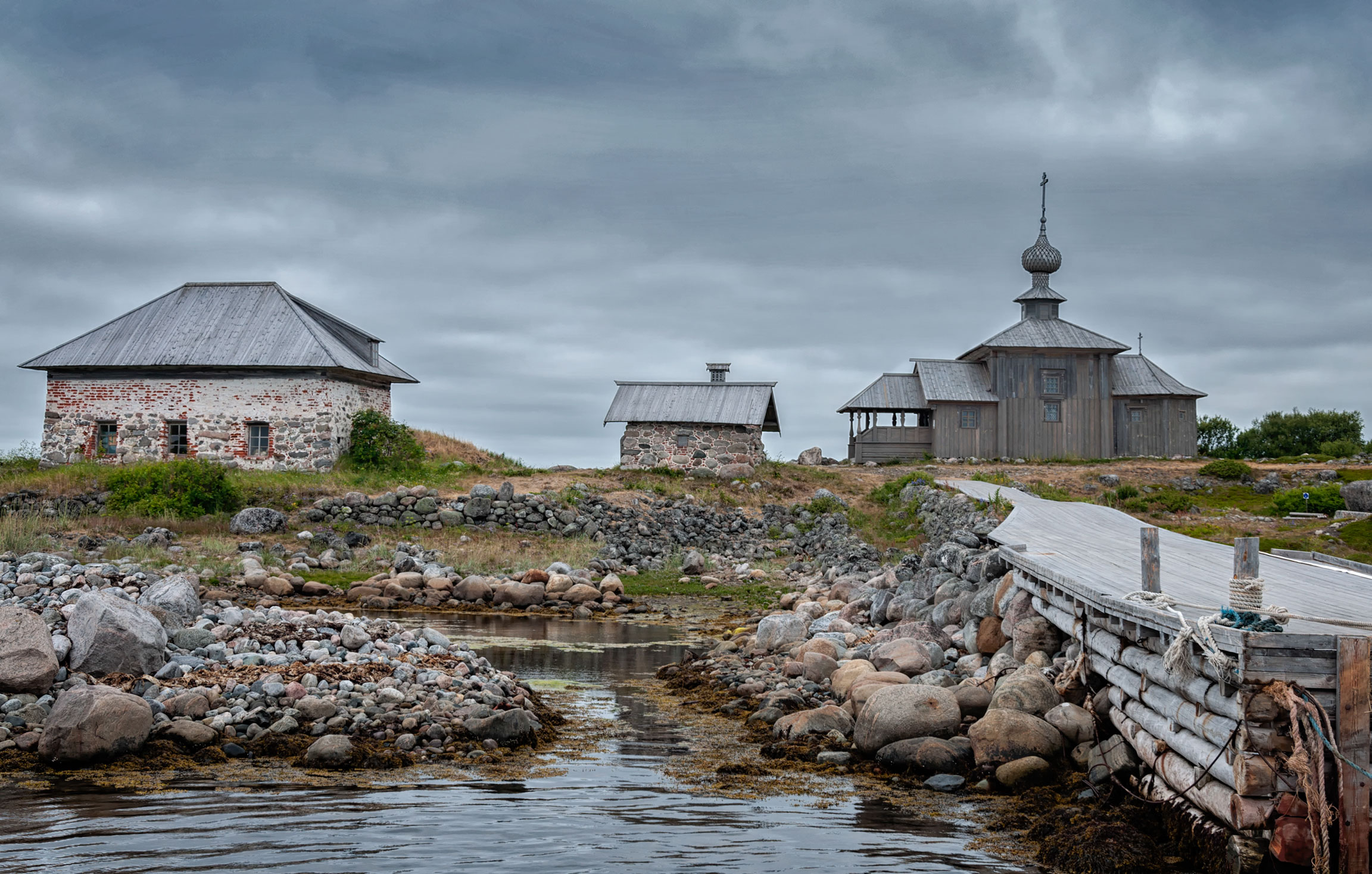 Андреевский скит Соловецкого монастыря.